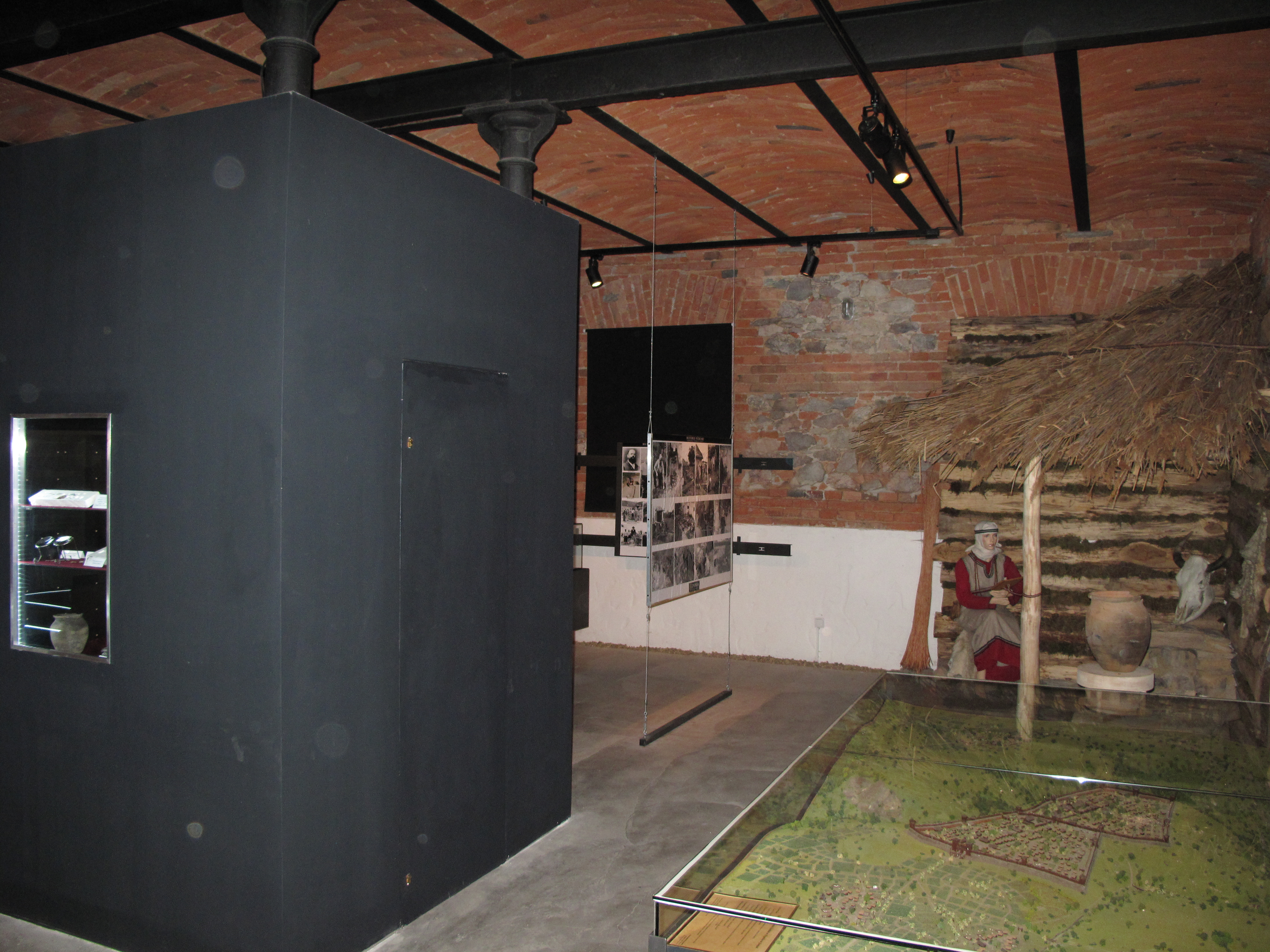 Interiér expozice muzea Hradiště sv. Hypolita. Okres Znojmo, Česká republika.